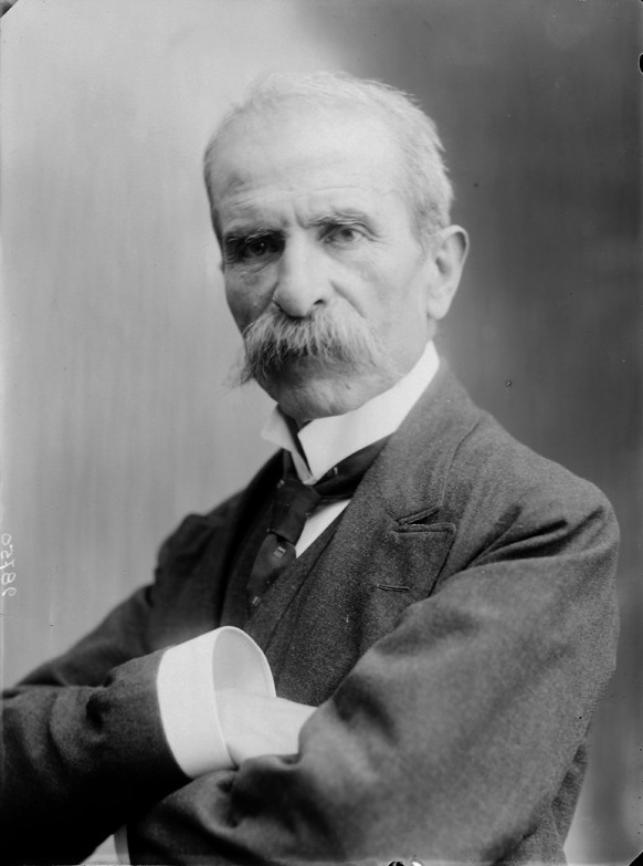 Antonio Bortone fotografato da Mario Nunes Vais